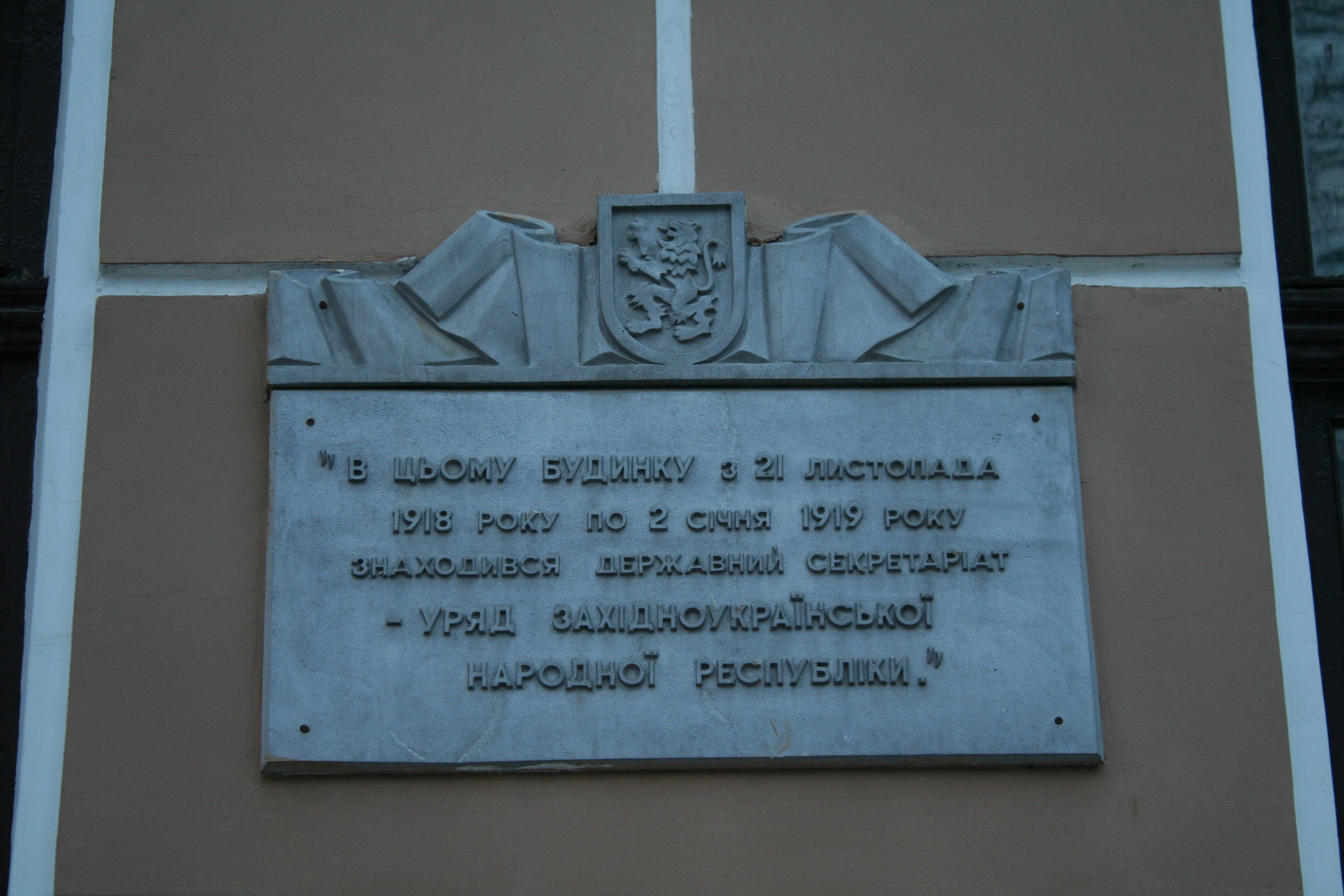 м.Тернопіль, вул. Грушевського, 2, Гімназія Ю.Словацького, в якій знаходився уряд Західно-Української Народної Республіки, працював голова уряду Голубович Сидір Тимофійович (мур.), фрагмент, мемореальна дошка